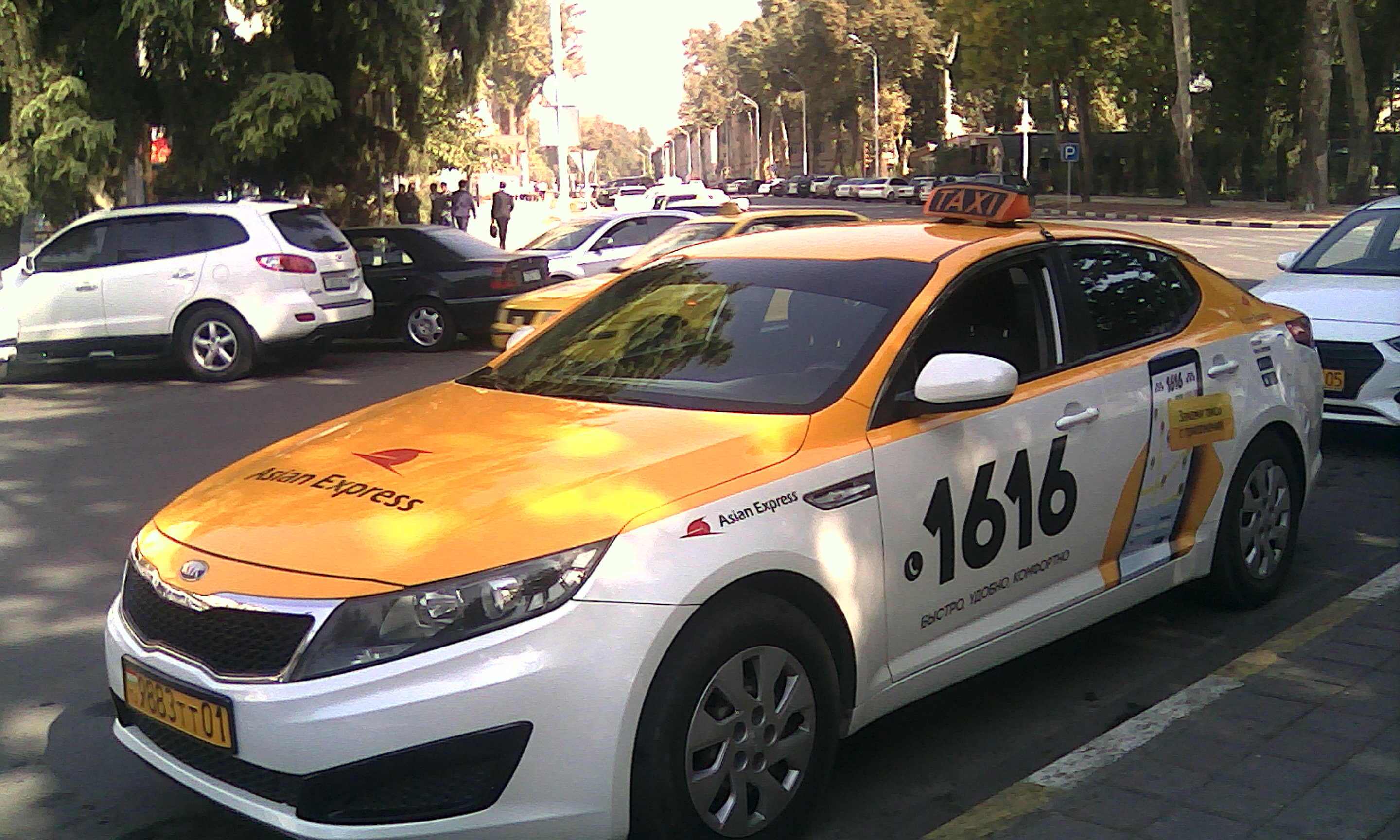 Душанбинское такси